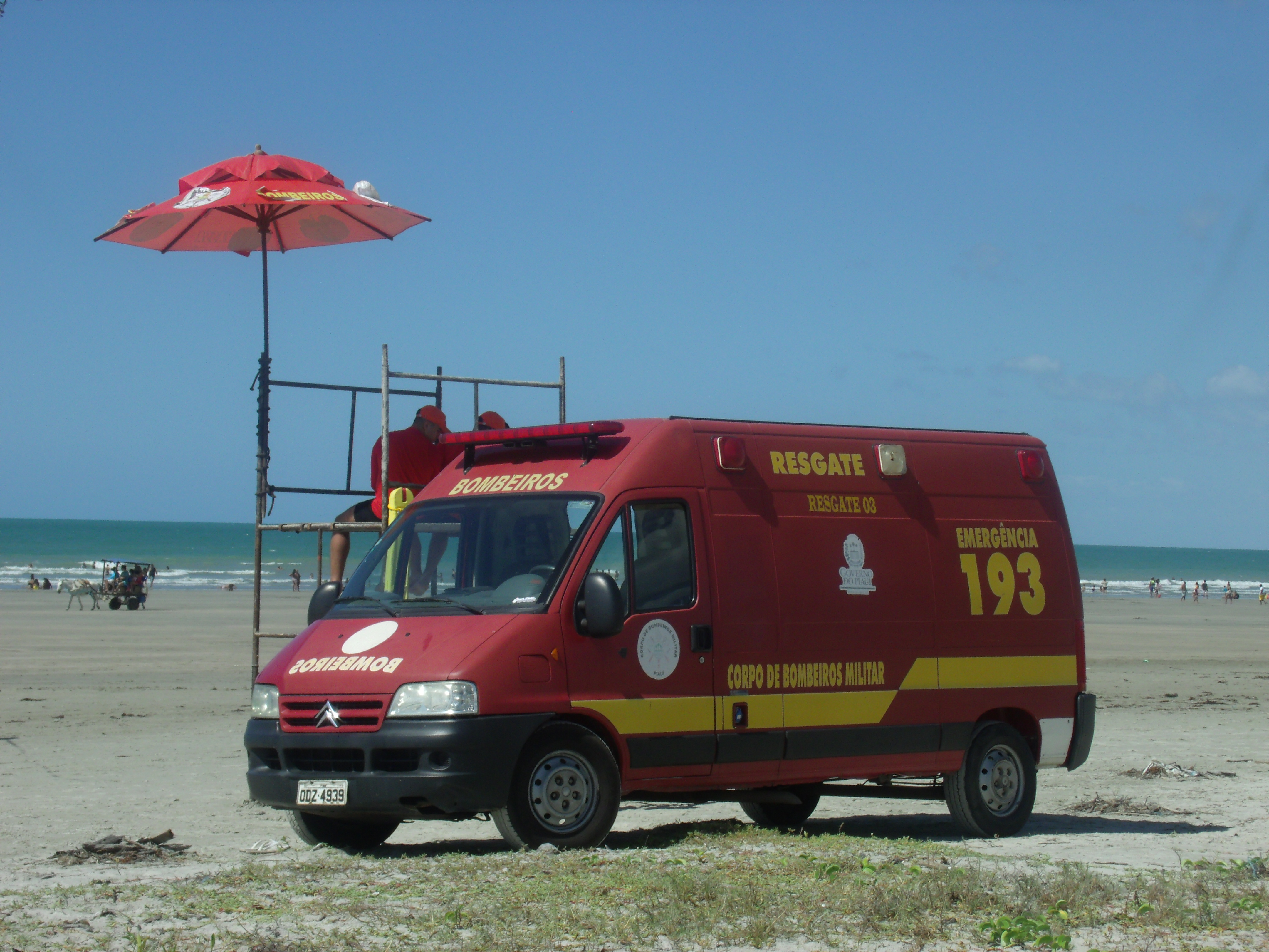 Viatura do Corpo de Bombeiros Militar do Estado do Piauí em guarda no litoral do estado.